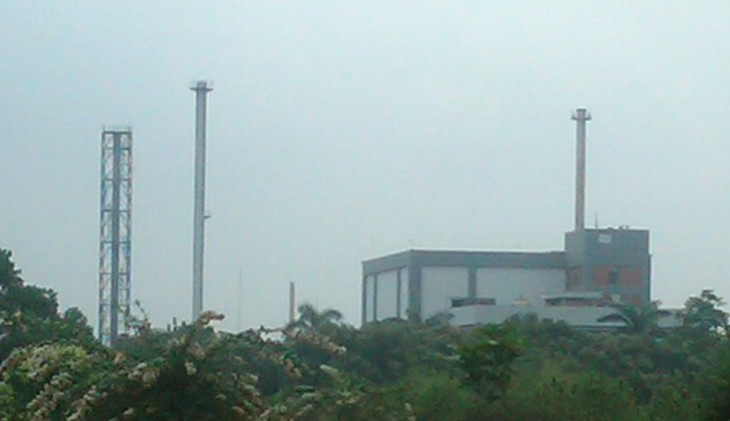 Reaktor Serba Guna - G.A. Siwabessy